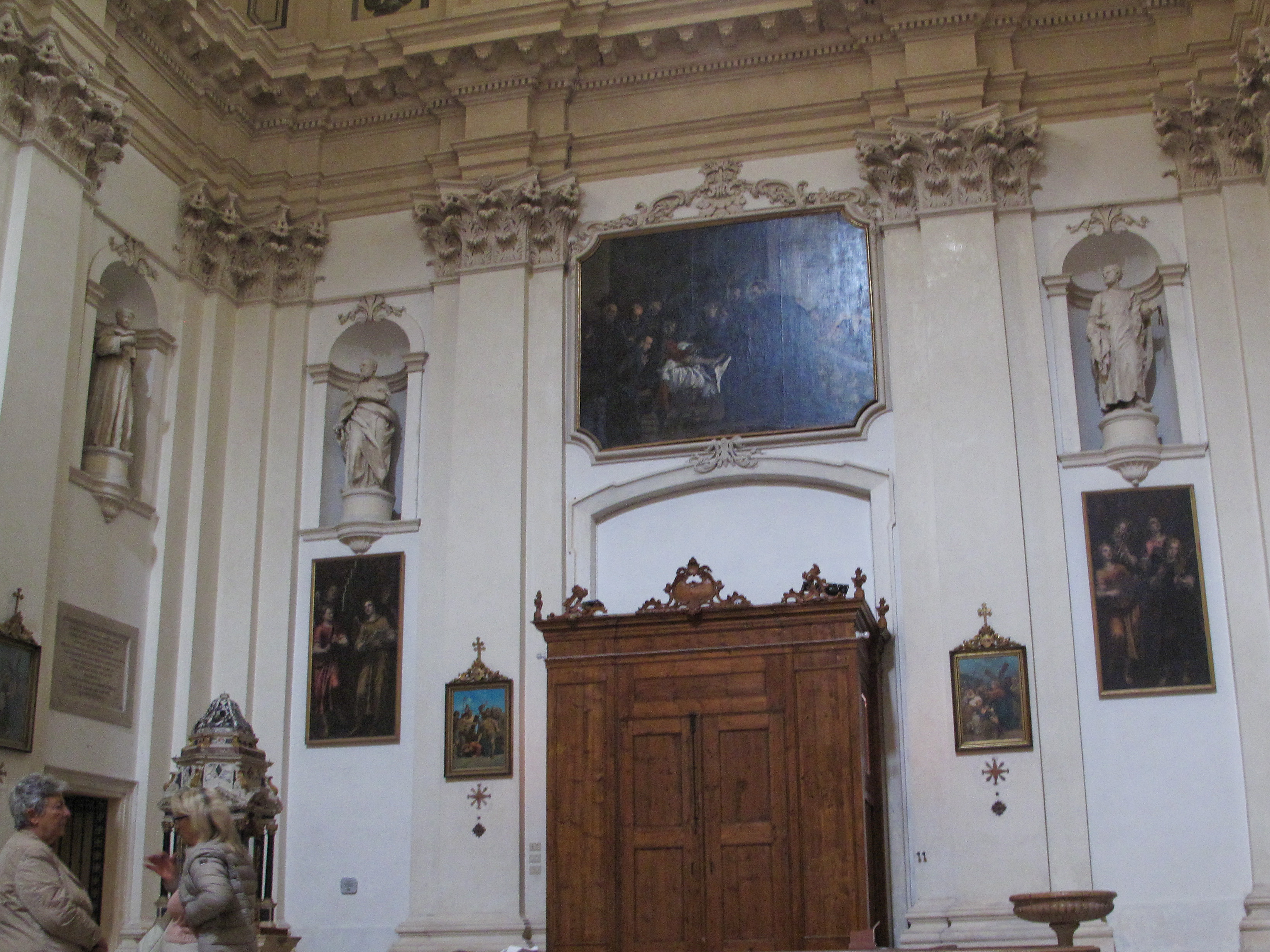 Vicenza - Chiesa di Santo Stefano, retrofacciata